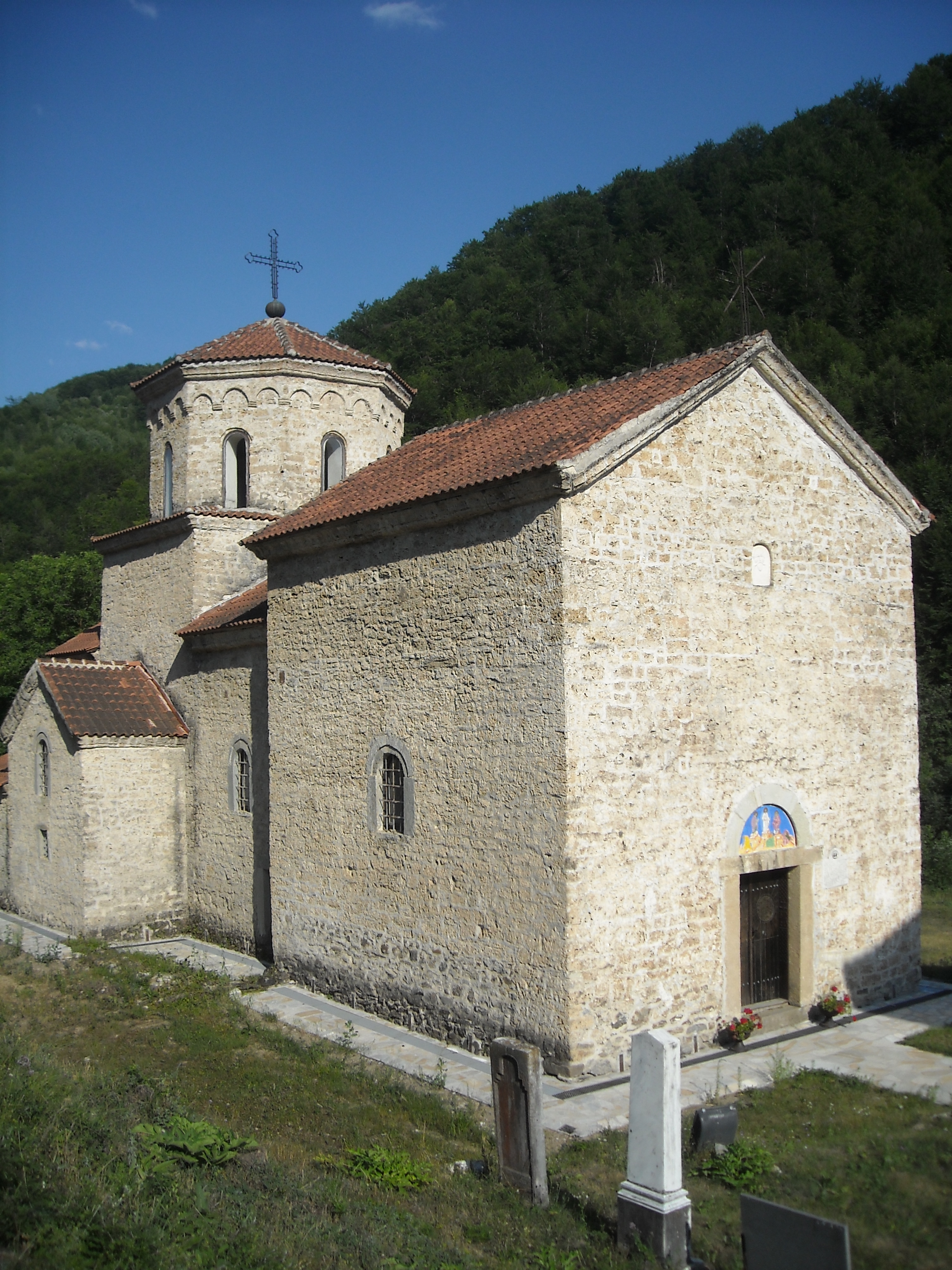 Црква Преображења у Придворици